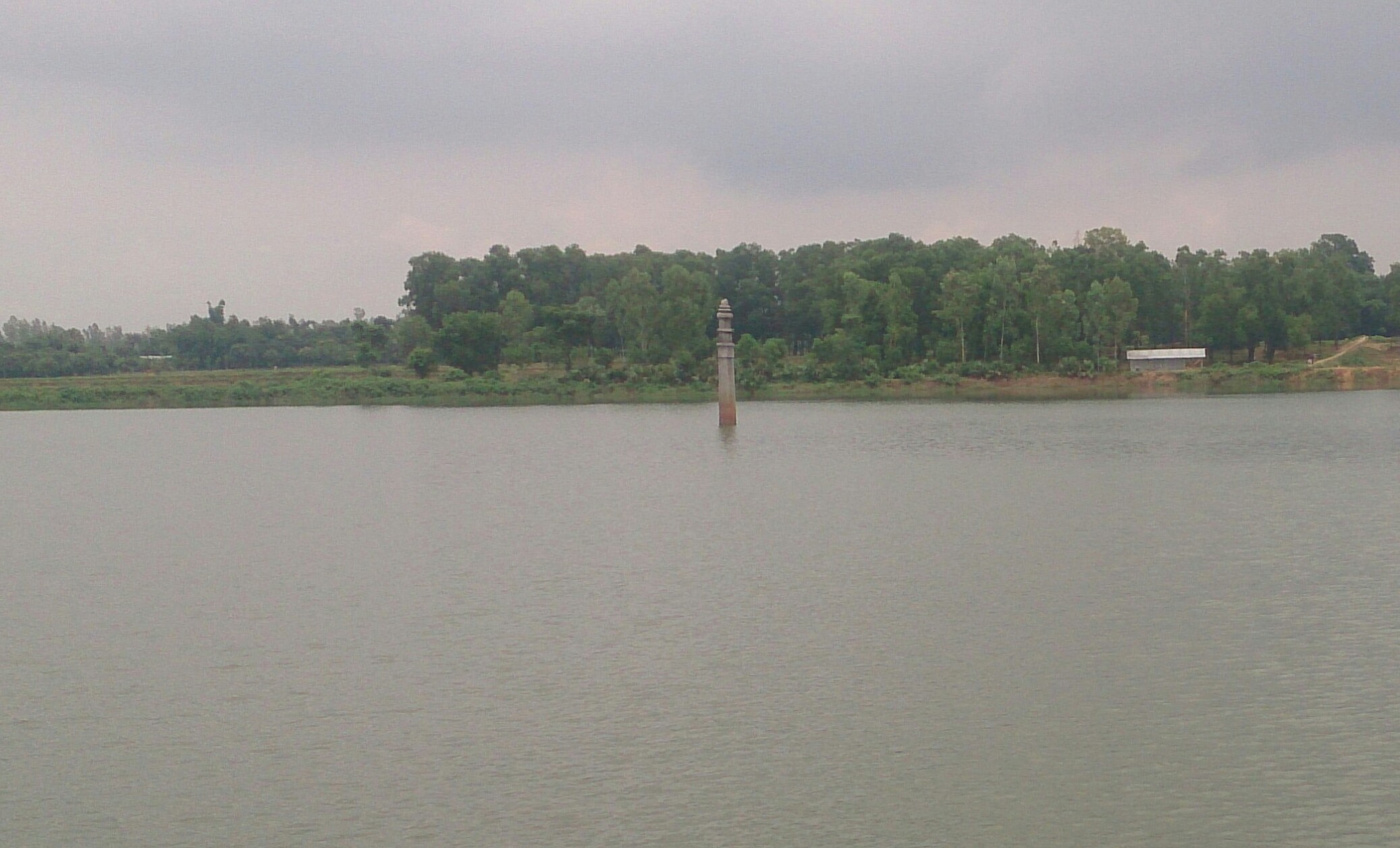 ঐতিহাসিক দিবর দিঘী, পত্নীতলা, নওগাঁ।